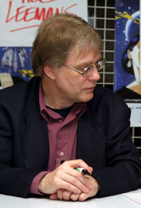 Hec Leemans, tekenaar van fc de kampioenen